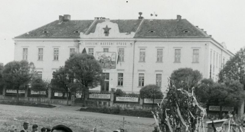 Během Rakouska-Uherska a první republiky okresní chudobinec, potom domov pro děti z bombardované Plzně, později sídlo ONV Blovice a momentálně (od roku 1960) budova zemědělské školy